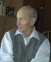 Janusz Żurakowski c.2003